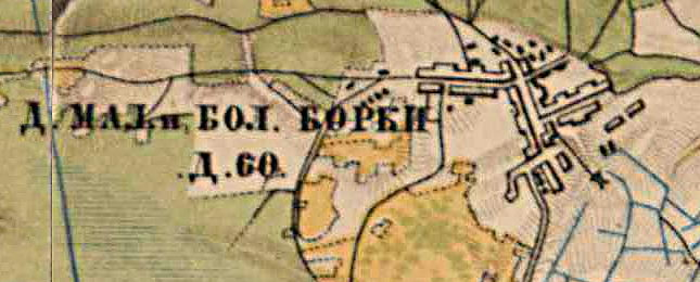 Деревня Борки на карте 1885 года.